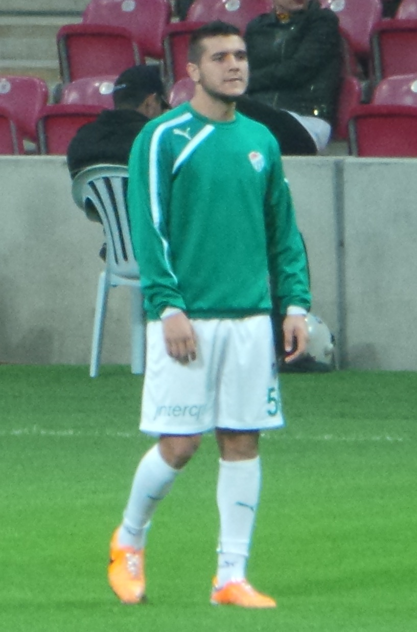 Ethem Ercan Pülgir